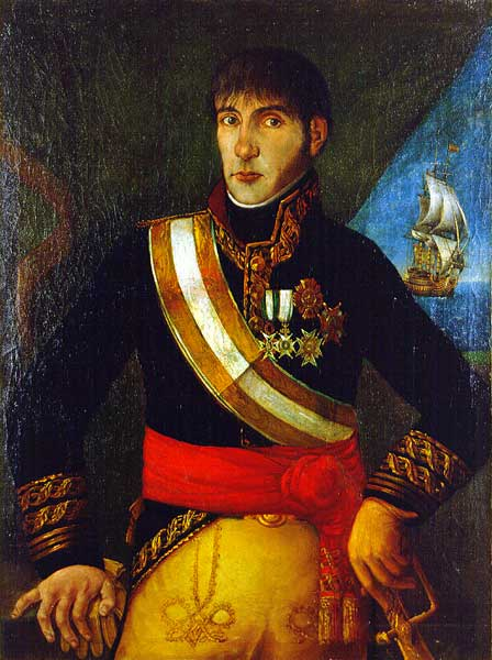 Retrato del teniente general Baltasar Hidalgo de Cisneros (1758-1829), que llegó a ser virrey del Río de la Plata. Es un retrato de medio cuerpo, y el personaje viste uniforme de teniente general, que en aquella época era similar entre los miembros del ejército y los de la armada, y luce la banda de la Orden de Isabel la Católica, la cruz de caballero de la Orden de Carlos III y la placa de comendador de dicha orden, la placa de la gran cruz de la Orden de San Hermenegildo, y las placas de las órdenes de Isabel la Católica y de la Orden de la Flor de Lis de Francia. El retrato fue depositado en el Museo Naval de Madrid por su hijo, José Hidalgo de Cisneros, que era brigadier de la Guardia Civil, en 1852, y fue restaurado en 1993.